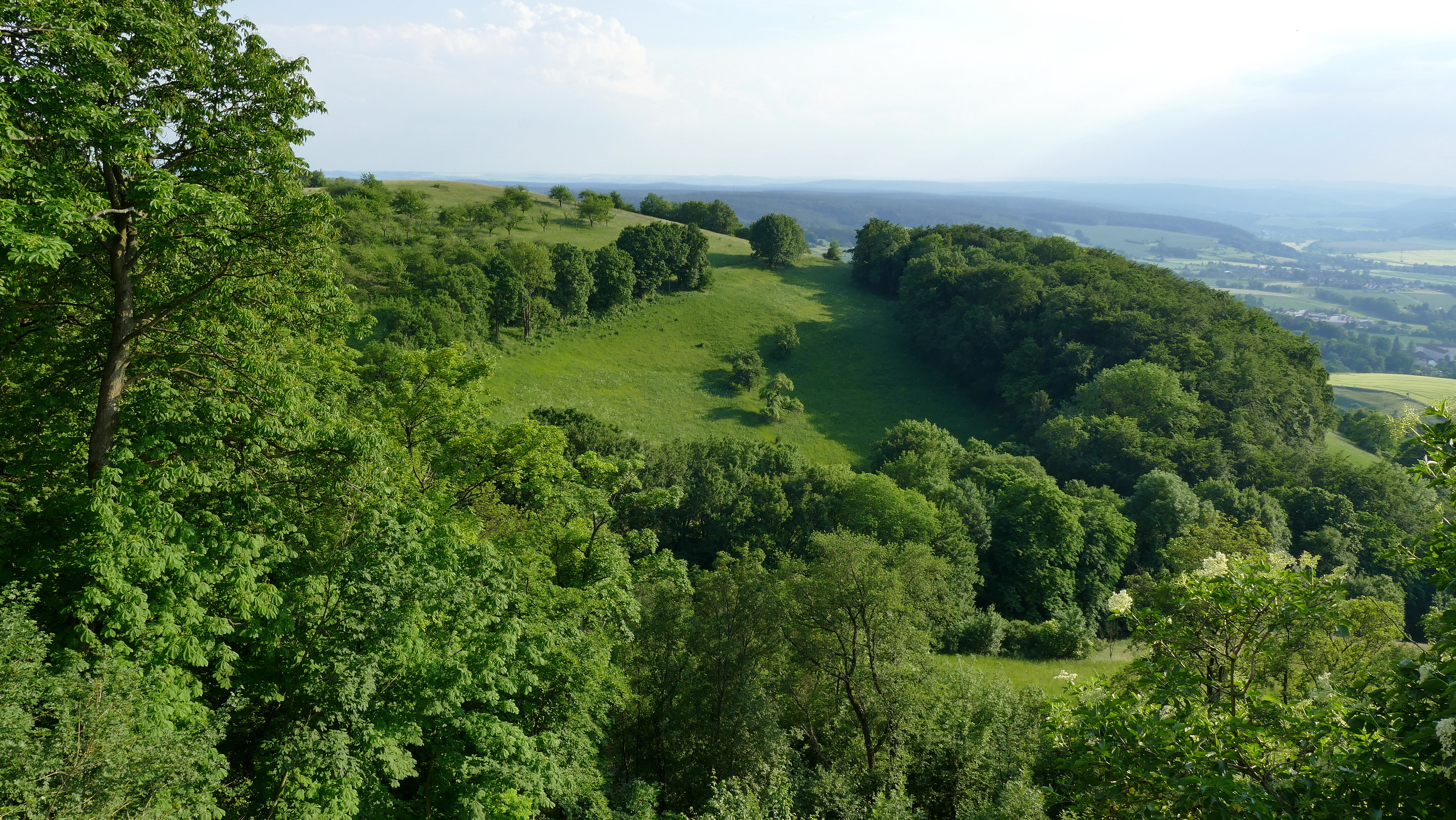 Der Pfaffenberg, hier von der Leuchtenburg aus gesehen, liegt im Naturschutzgebiet Nr. 174 "Dohlenstein und Pfaffenberg". Gleichzeitig befindet er sich im Landschaftsschutzgebiet Nr. 104 "Saaletal in den Fluren Göschwitz bis Kahla" (WDPA: 345190) und im FFH-Gebiet mit der EU-Nr. 5135-301 "Dohlenstein und Pfaffenberg".